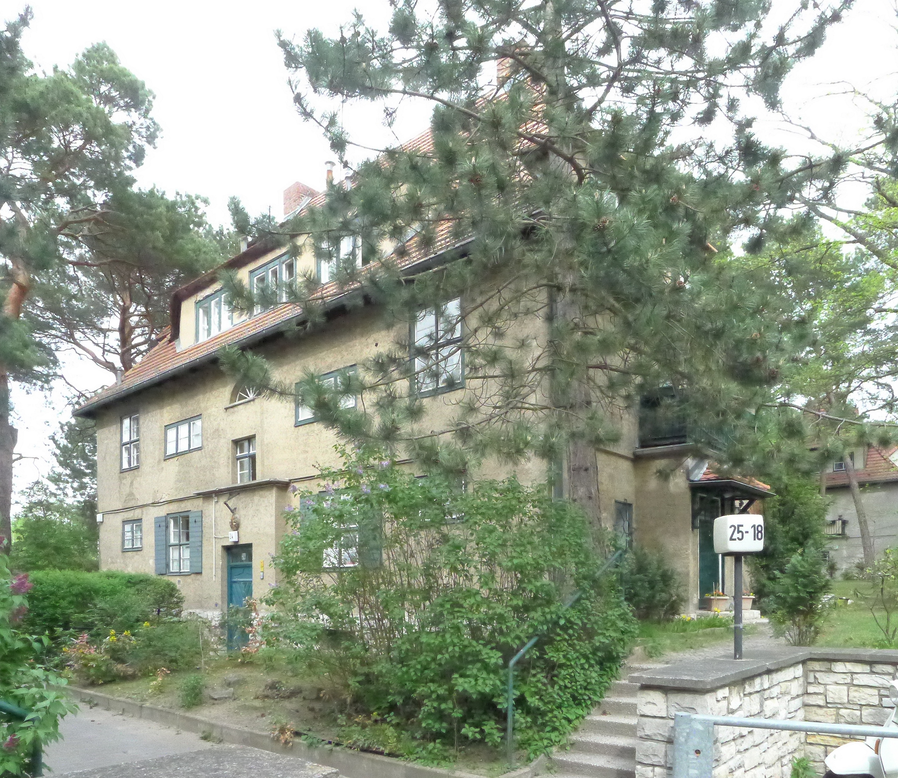 Wohnhaus